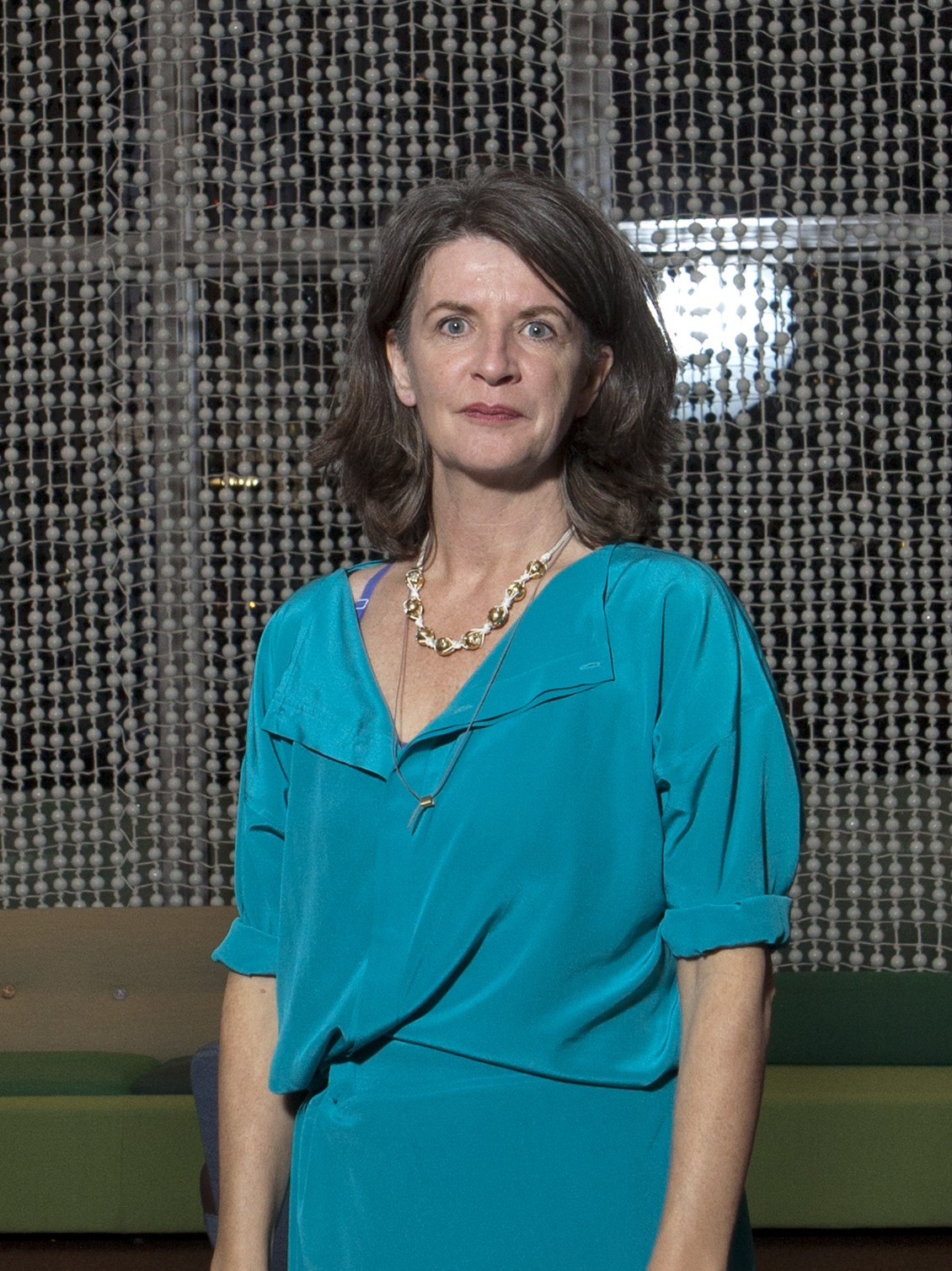 Opening Delegates Lounge_16